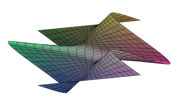 Cônoïde : surface réglée Licensing Source : image créée par l'auteur (Theon)